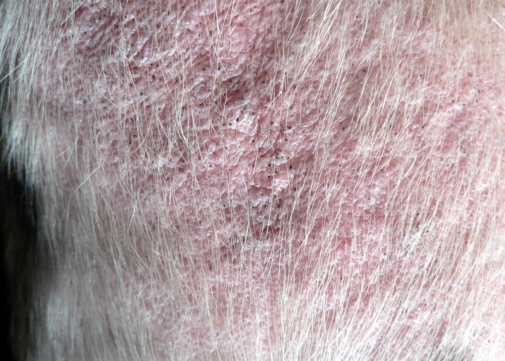 Bulteriér: Demodikóza, kožné ochorenie spôsobené roztočami. Tmavé bodky sú chlpové folikuly napadnuté premnoženými roztočami. Folikula sa zapáli a chlp vypadne. Koža je červená, zdurená, pri dlhotrvajúcej chorobe nastúpi sekundárna bakteriálna infekcia, ktorá sa prejavuje ako akné. english: Bull Terrier demodikosis